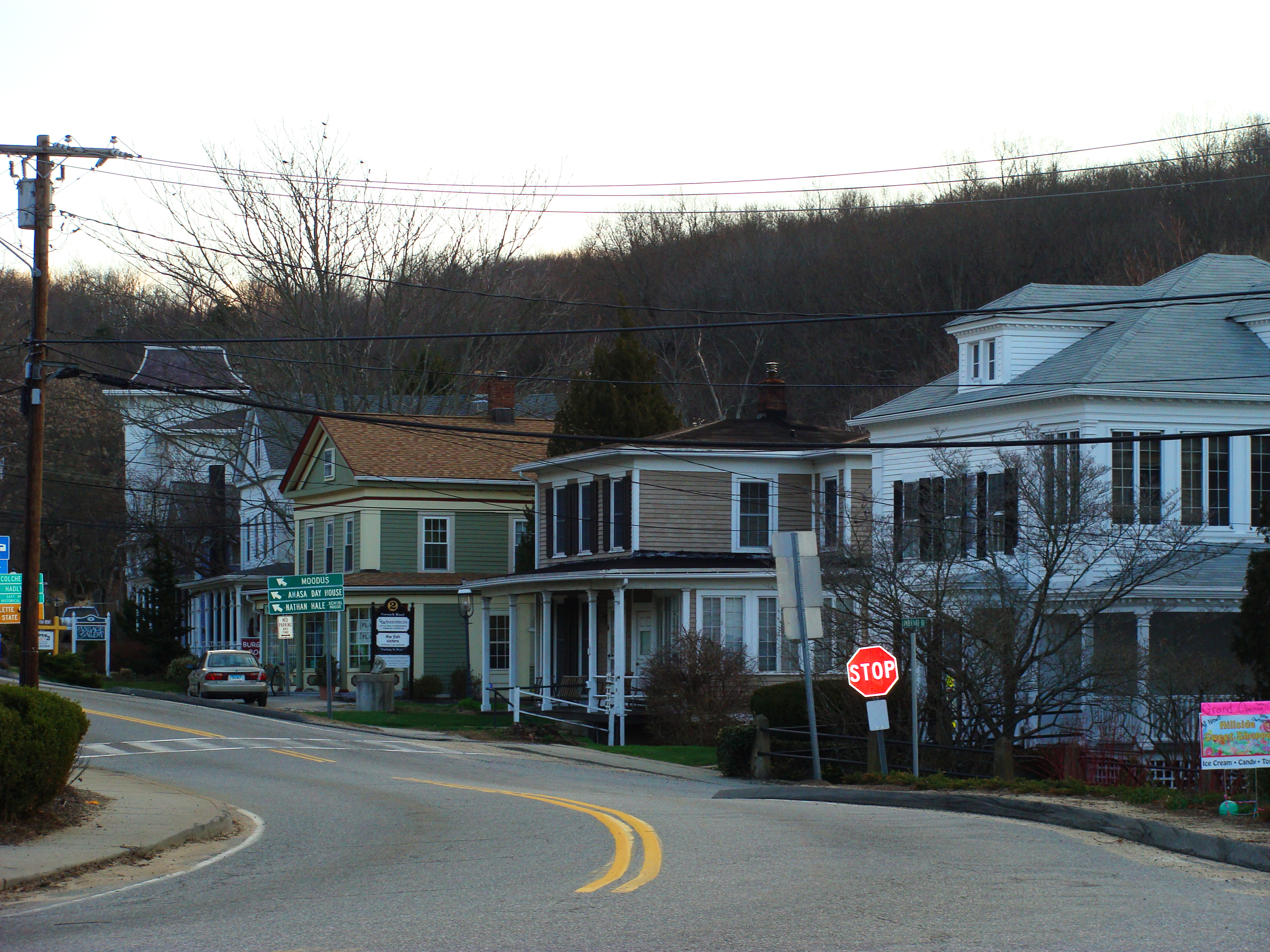 Vereinigte Staaten: East Haddam in Connecticut